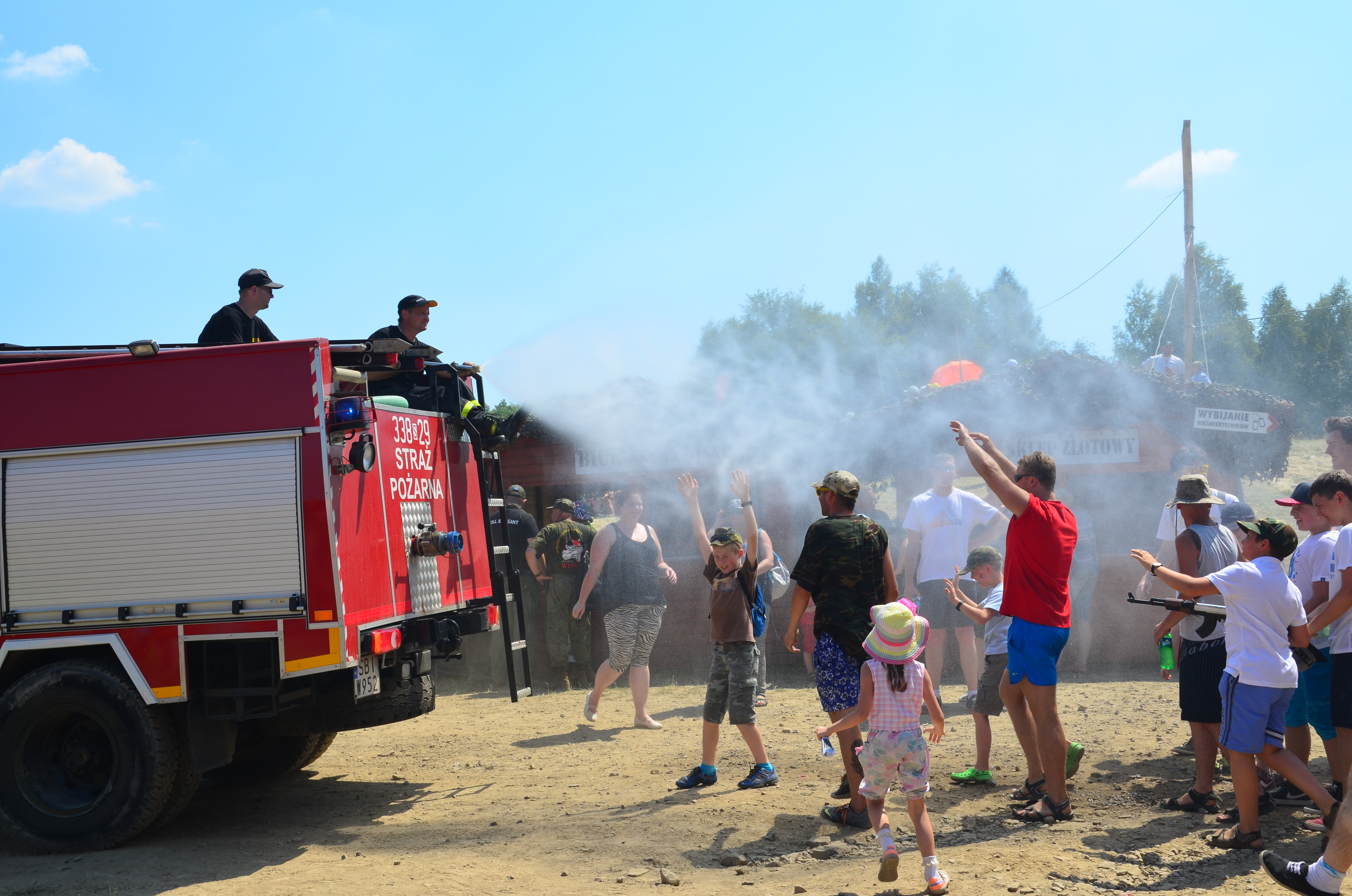 In Beskiden schießt Thermometer auf 37